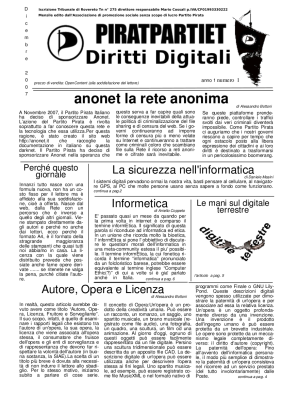 Prima pagina del primo numero del Piratpartiet